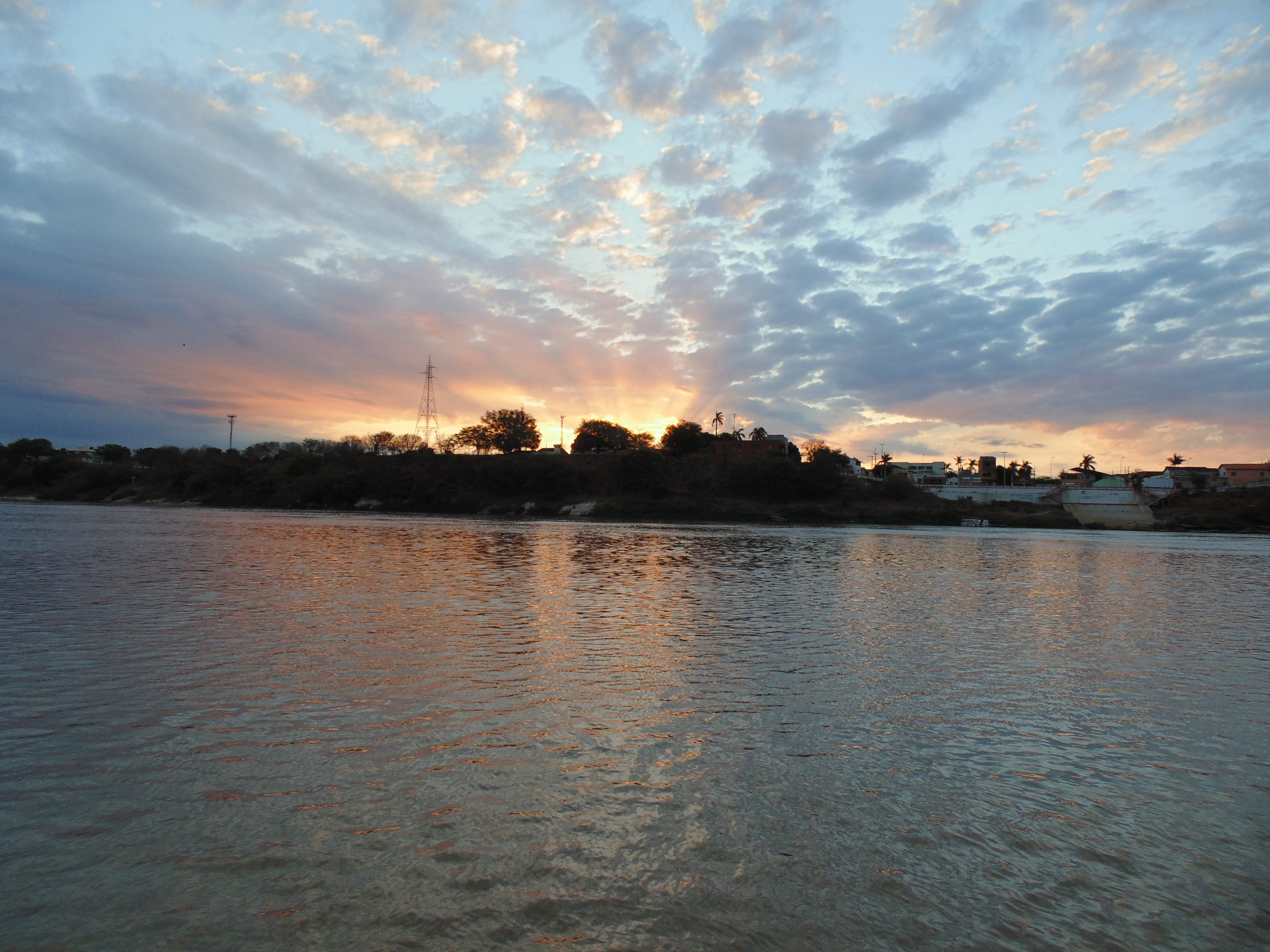 Fim de tarde em Manga, o quadro da natureza é pintado pelo sol que a cada pincelada mostra uma aquarela de cores sublimes. Refletindo nas águas do São Francisco um amor divinal.